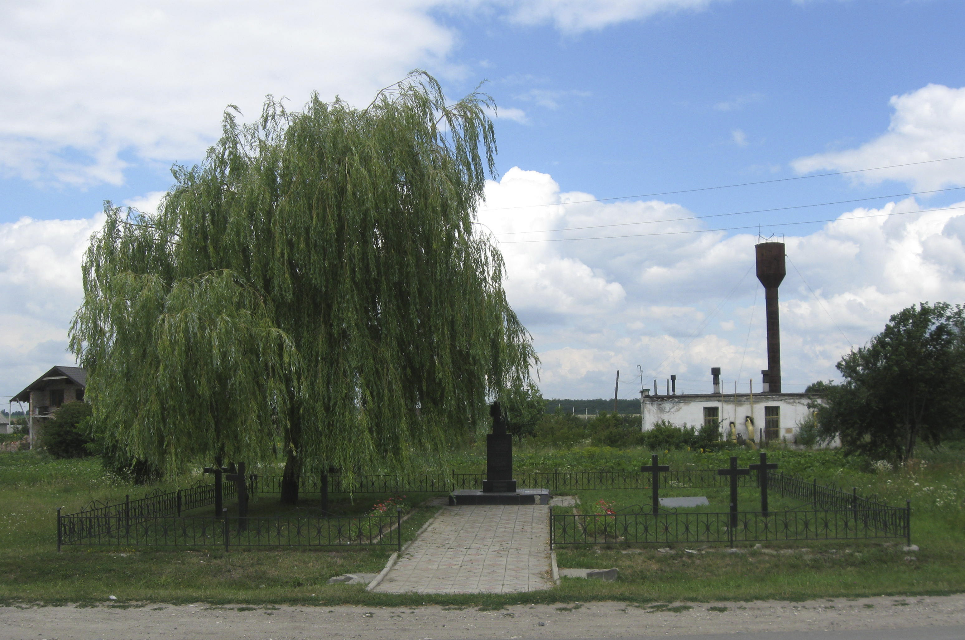 Братська могила воїнів австро - угорської армії